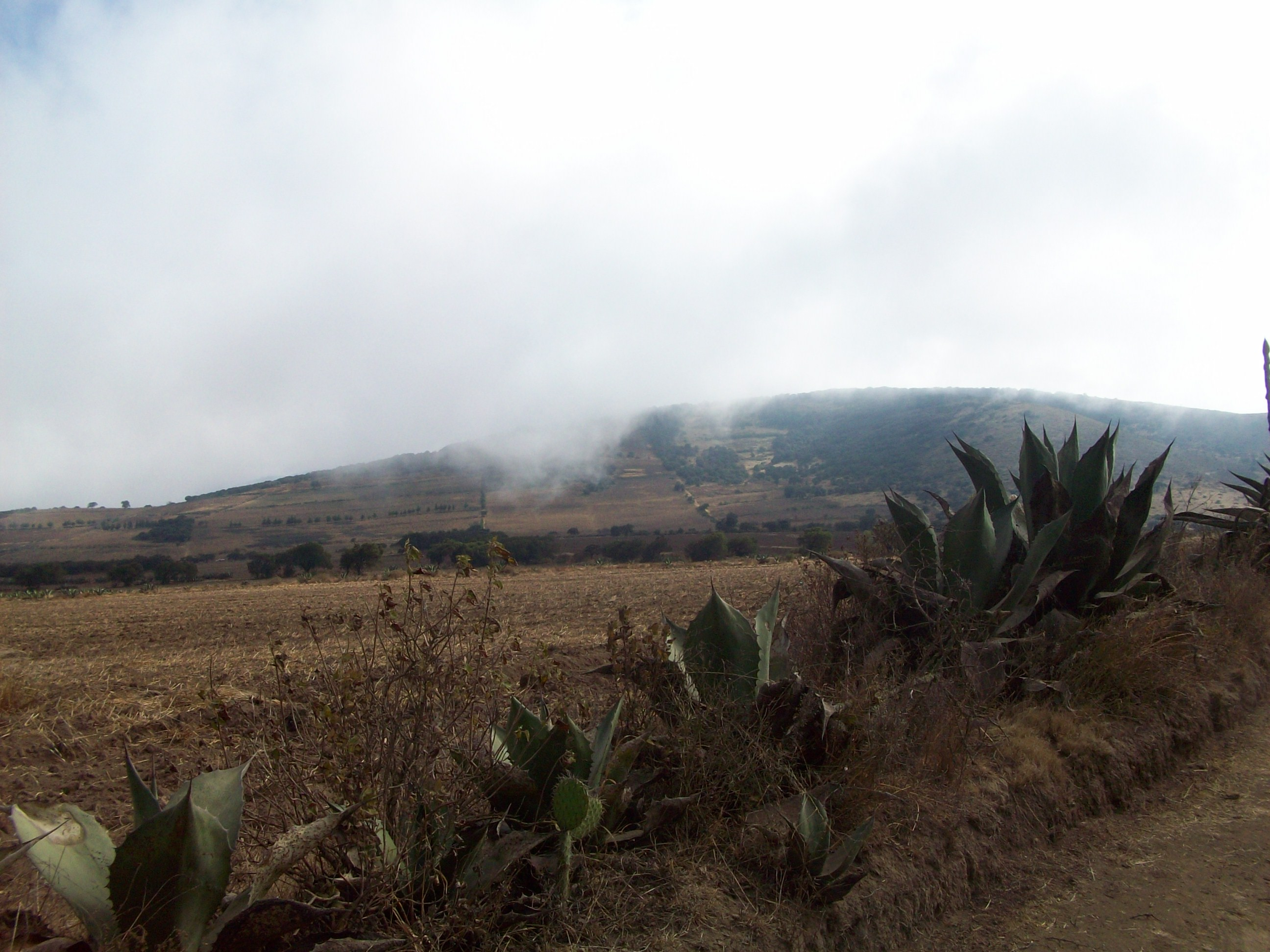 DETRAS DE CERRO GORDO